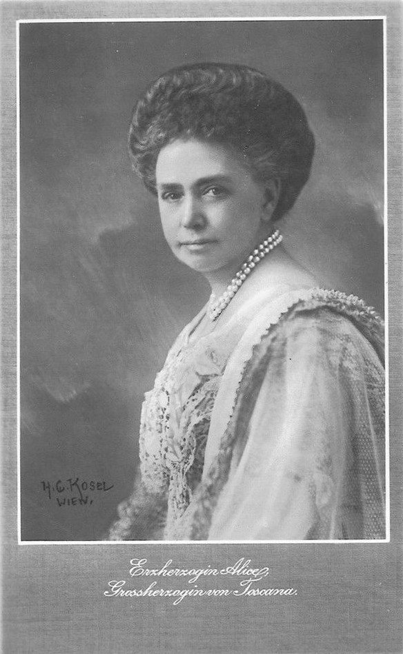 Alicia (Alix) von Bourbon-Parma, Tochter von Karl III Herzog von Parma, zweite Frau von Ferdinand IV Grossherzog von Toskana